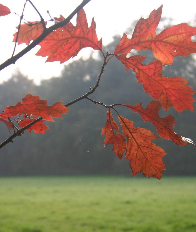 Eigen foto van herfstbladeren